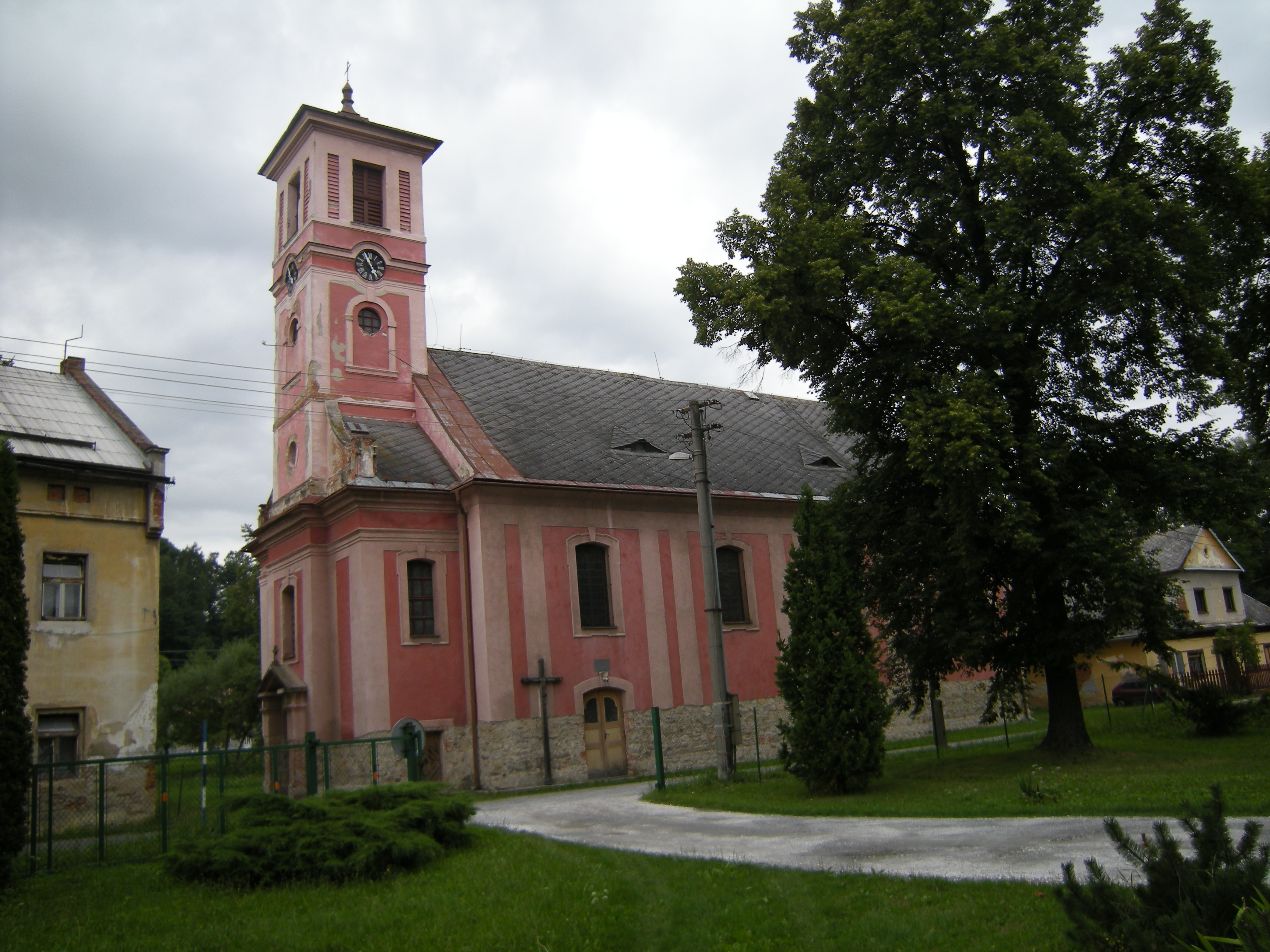 Katolicki kościół pw. św. Joachima z 1787 roku w Kobylá nad Vidnavkou